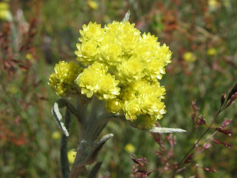 Sand-Strohblume Helichrysum arenarium, Müritz-Gebiet